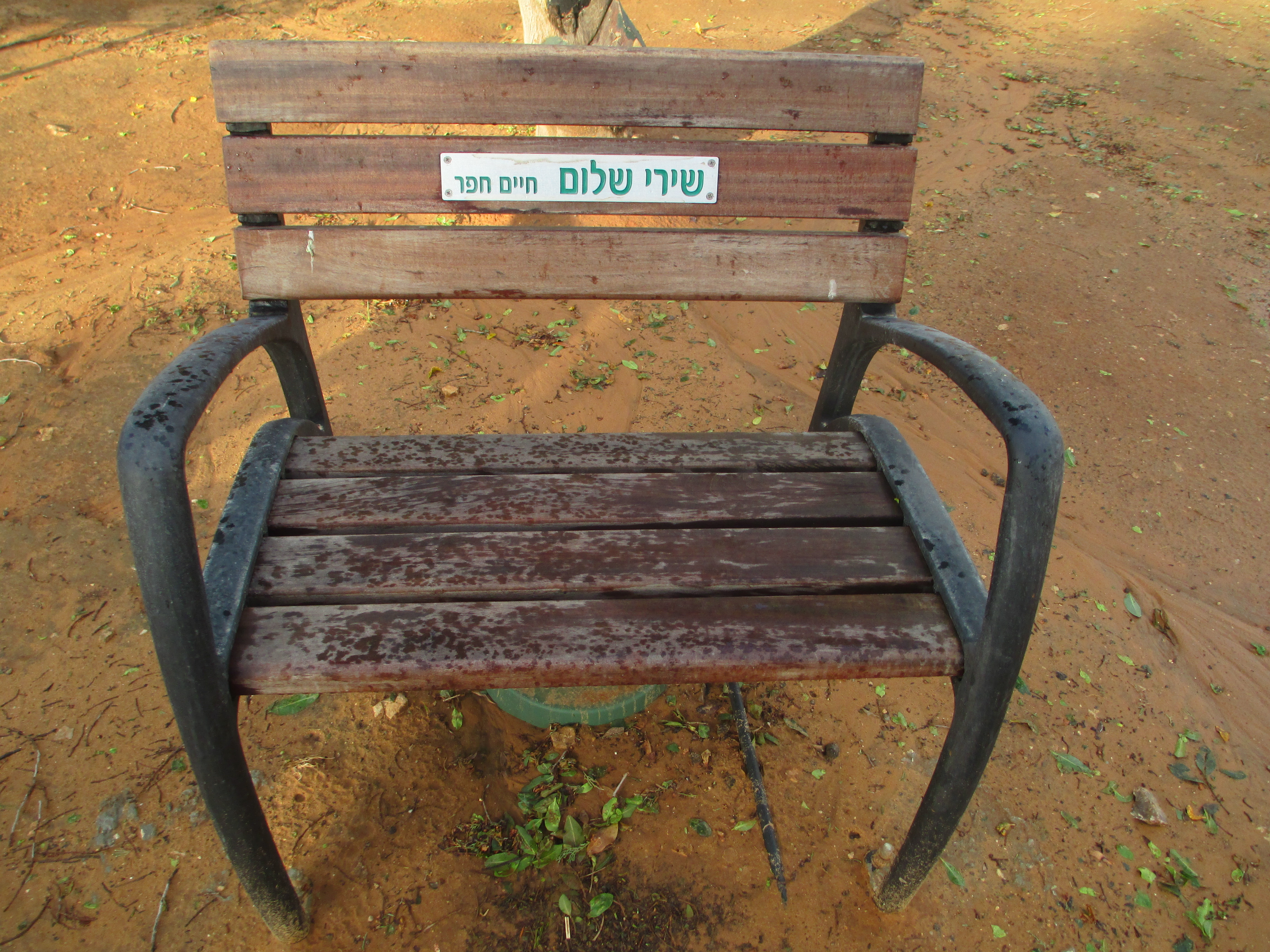 ספסל המשמיע שירי חיים חפר בשרונה